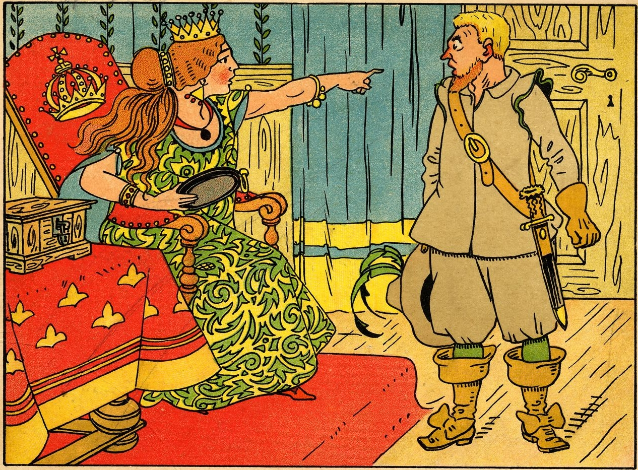 Schneewittchen. Ein Märchen in zwölf Bildern von Lothar Meggendorfer. Stuttgart: Weise.